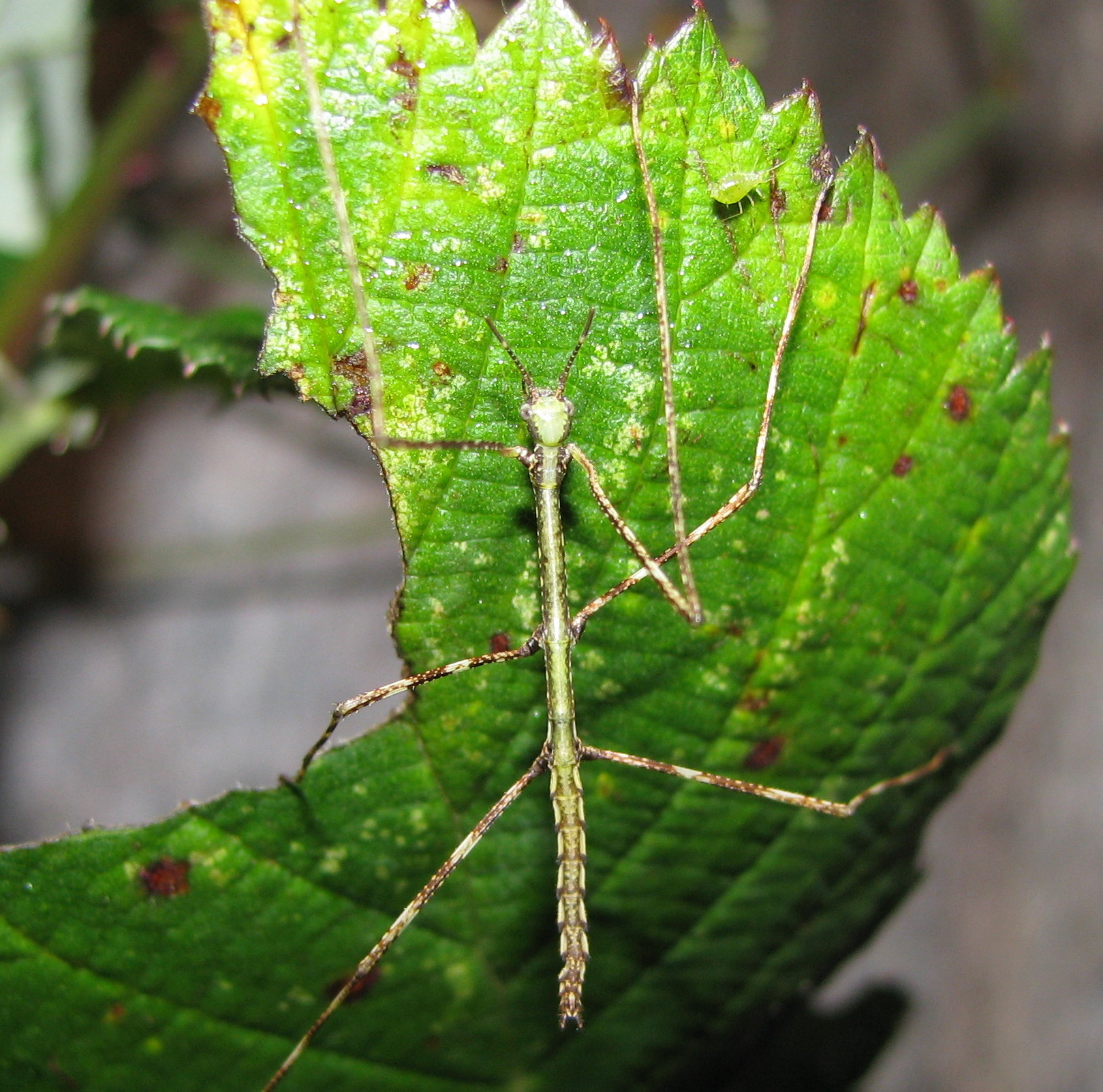 en.: Phobaeticus serratipes - even hatched larva de.: Riesen-Stabschrecke (Phobaeticus serratipes) - gerade geschlüpfte Larve